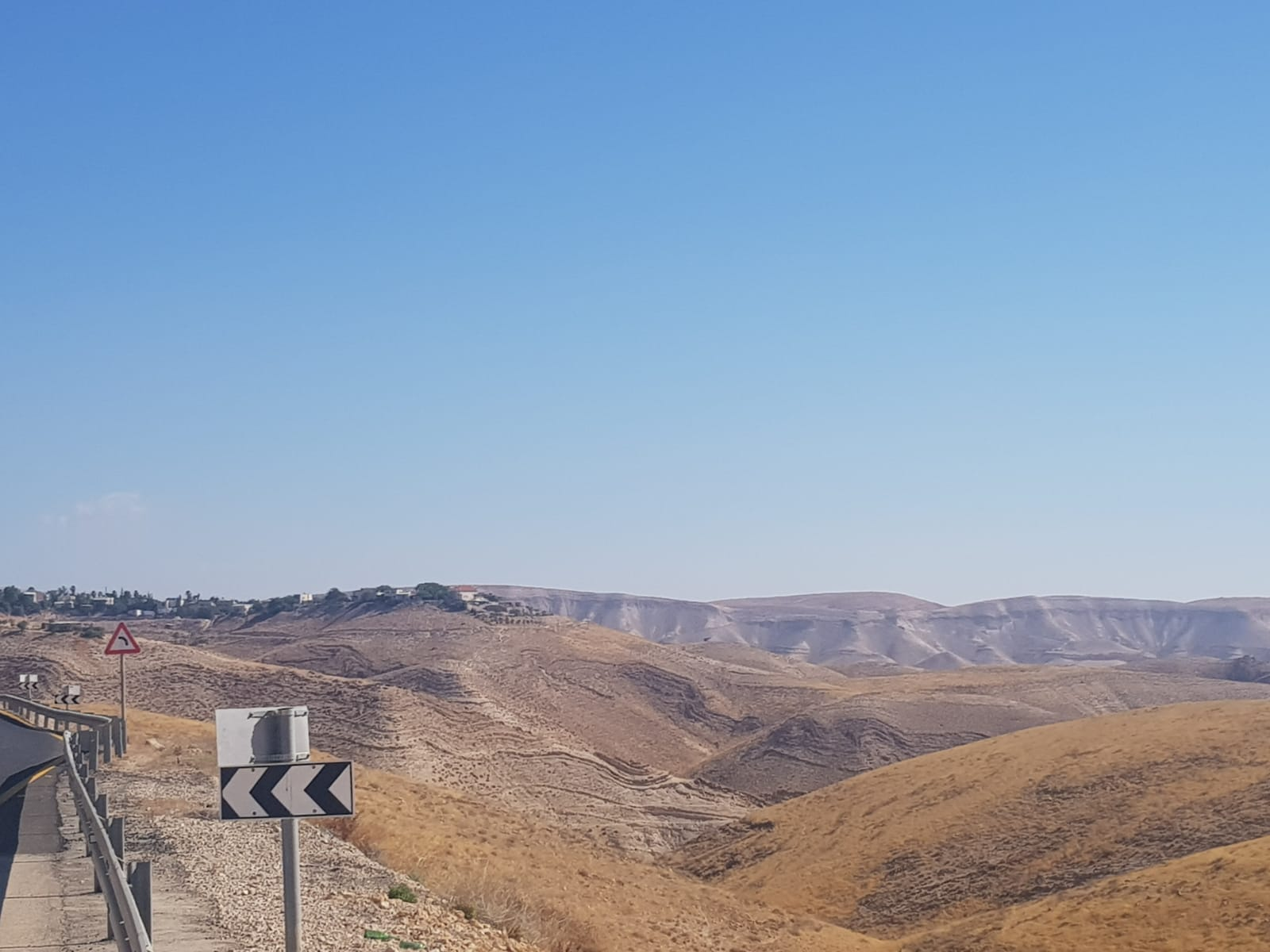 היישוב במבט לצפון